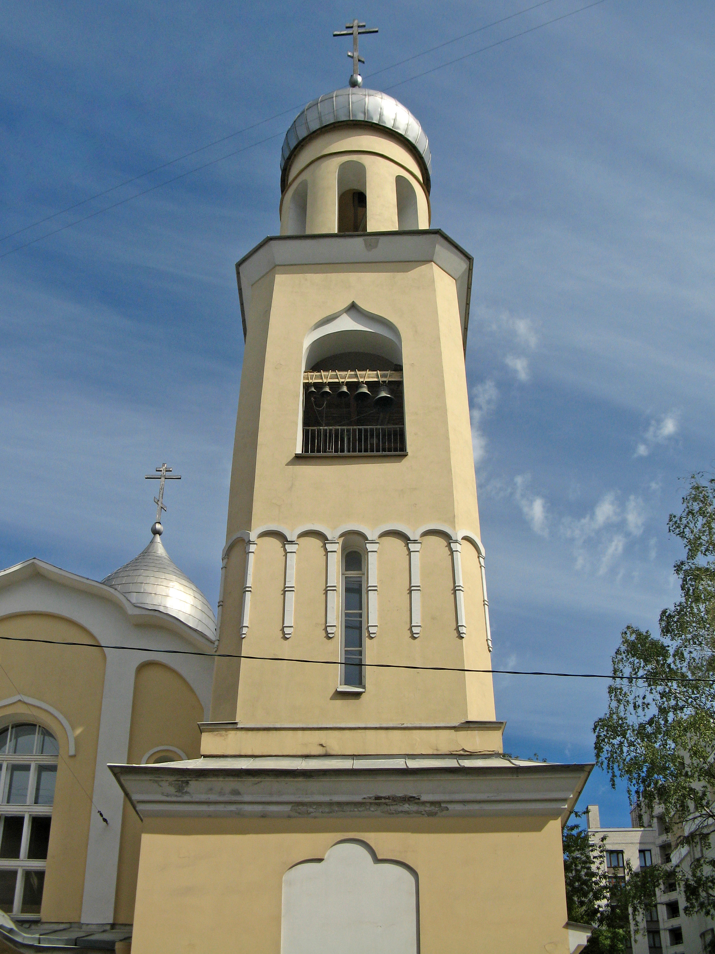 Церковь Анны Кашинской: проспект Большой Сампсониевский, 53, Выборгский район, Санкт-Петербург